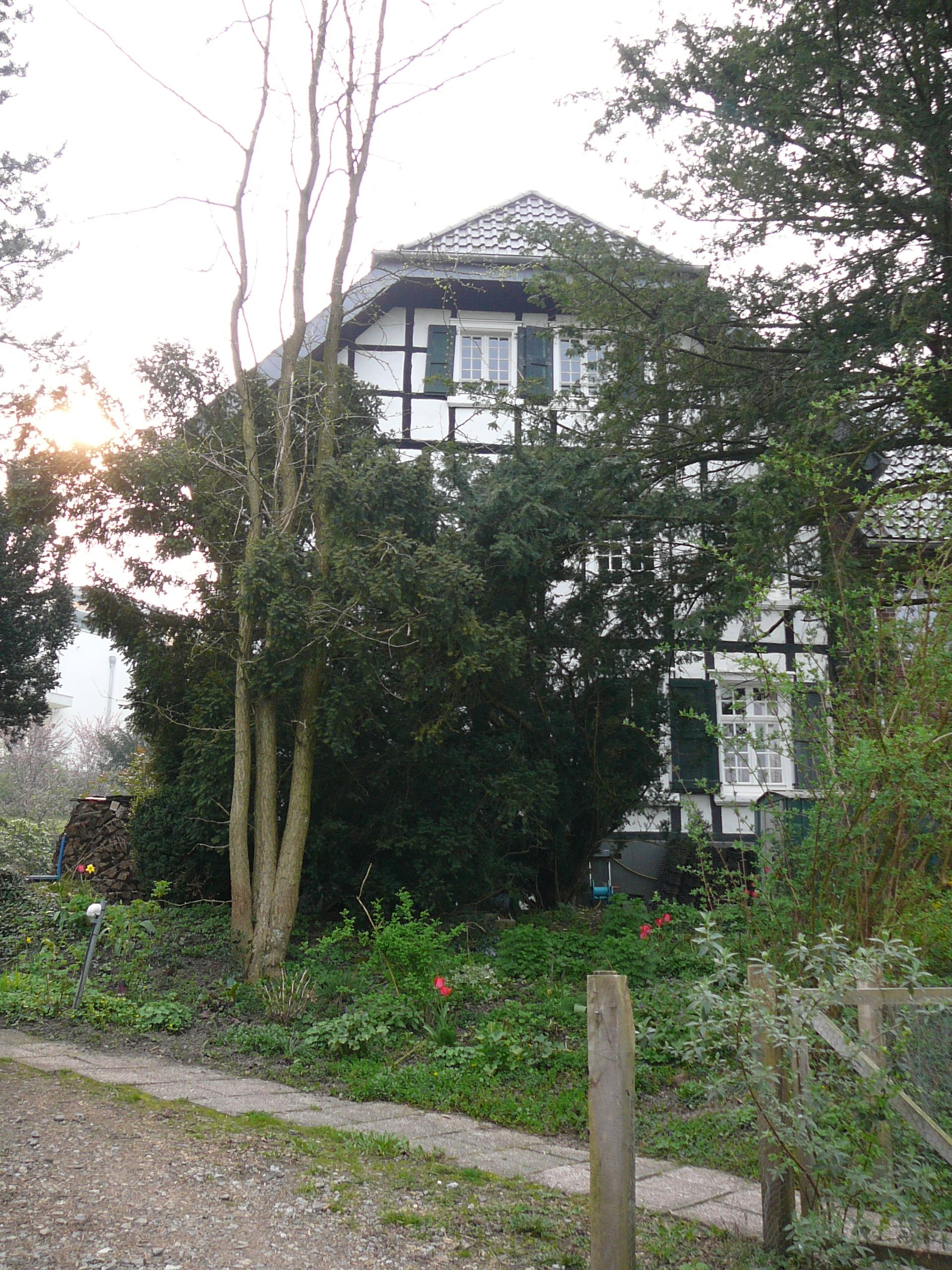 Funckstraße, Wuppertal